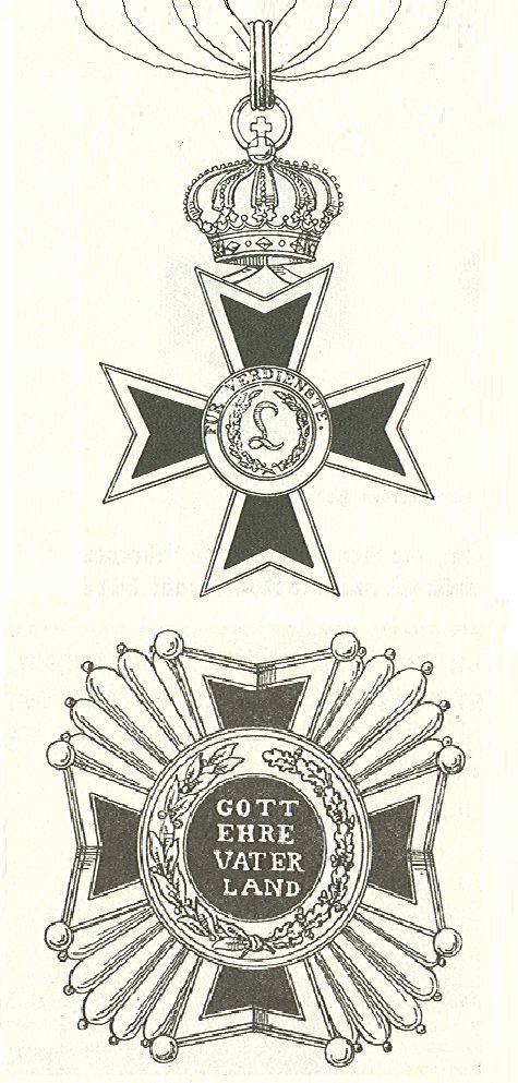 Scan van Blz. 150 van het boek "Handbuch der Ritter- und Verdienstorden " uitgegeven 1893 door Weber.Tekening van de in 1902 overleden Maximilian Gritzner. Robert Prummel 10 jul 2008 16:40 (CEST)